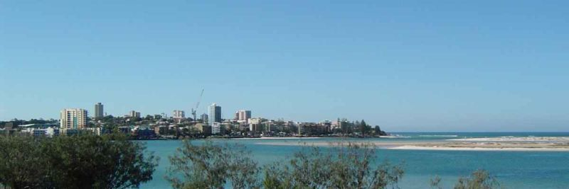 Caloundra:Vue de la ville